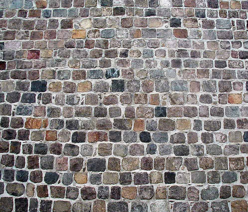 Mauerwerk aus eiszeitlichen Geschieben, aufgenommen in Angermünde an der Kirche Autor: Ralf Roletschek Marcela GNU-FDL (selbst aufgenommen)